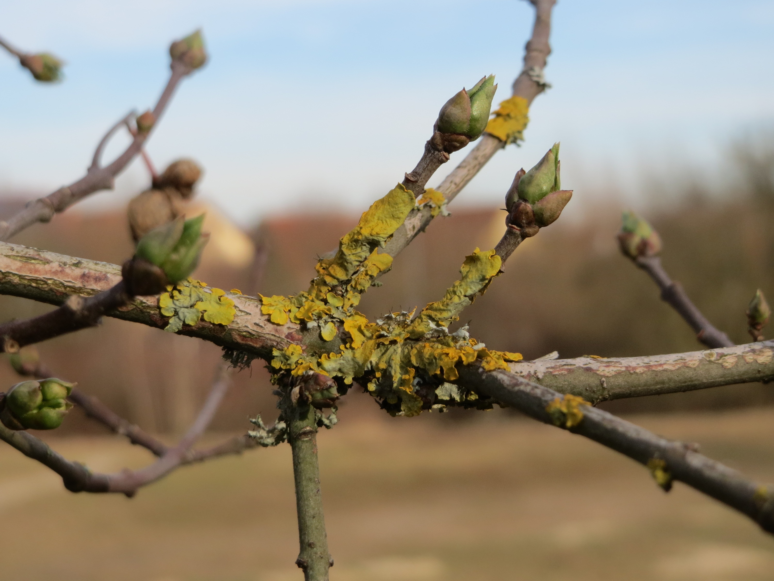 Gewöhnlicher Spindelstrauch oder Pfaffenhütchen (Euonymus europaeus) in Hockenheim